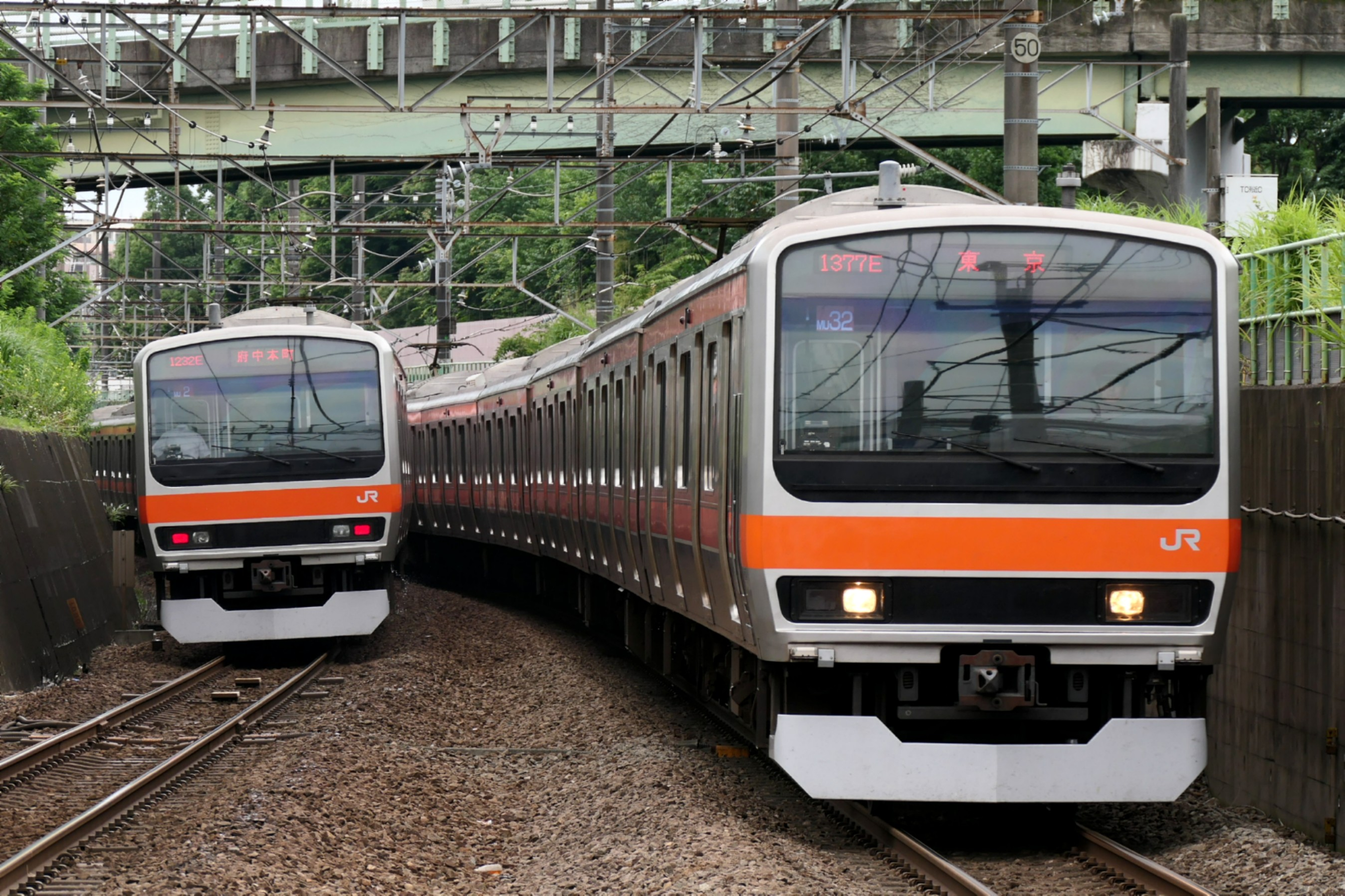 JR武蔵野線E231系電車